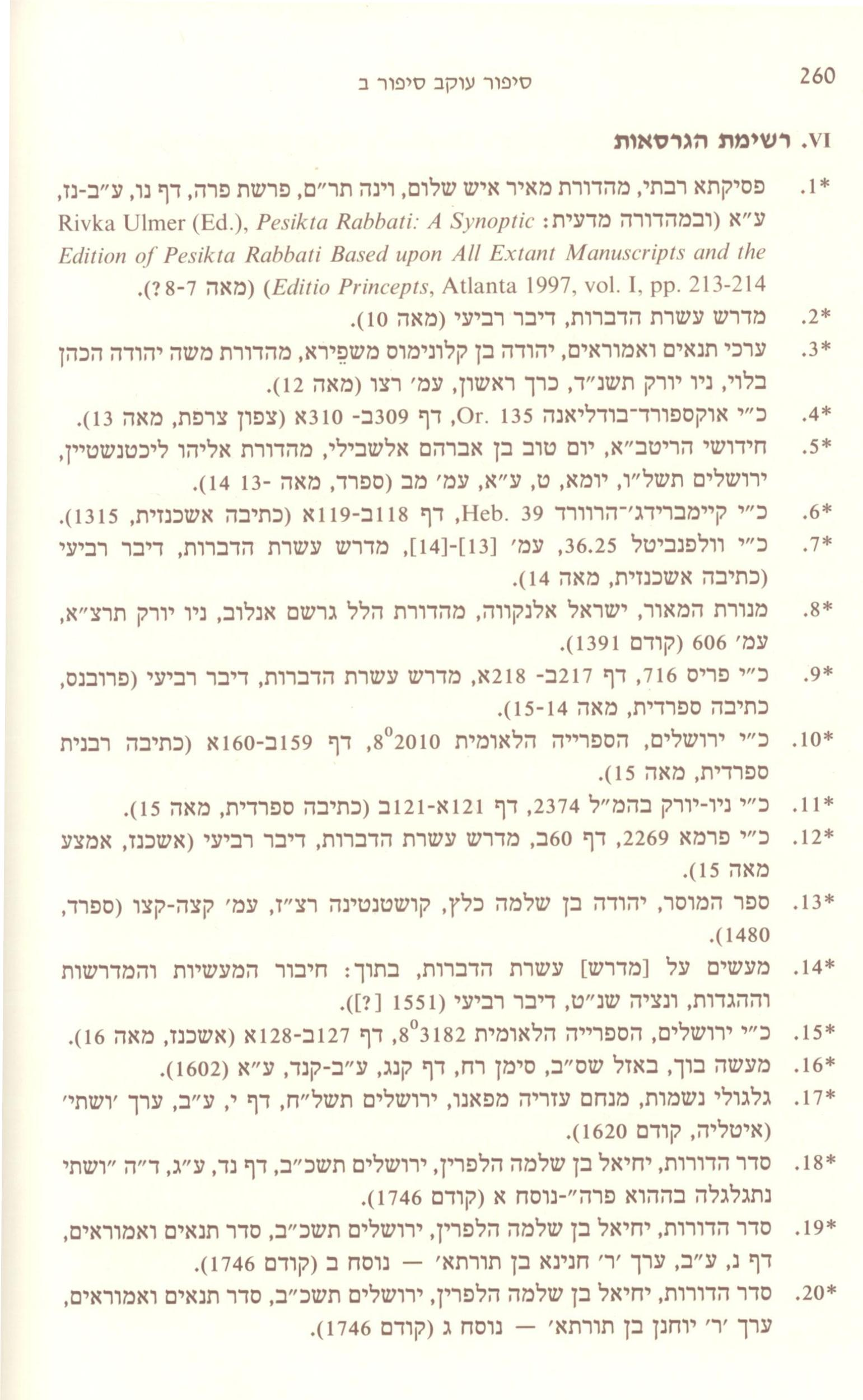 קטע מרשימת הגרסאות של הערך 'פרה שומרת שבת', כרך ב.